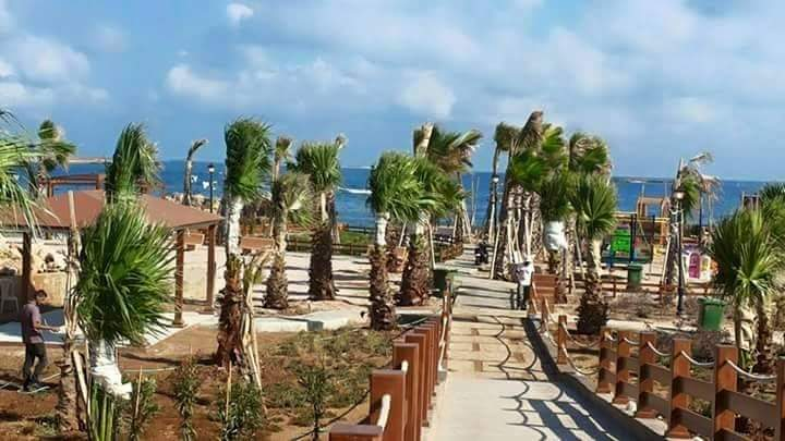 جزيرة عبد الوهاب - طرابلس